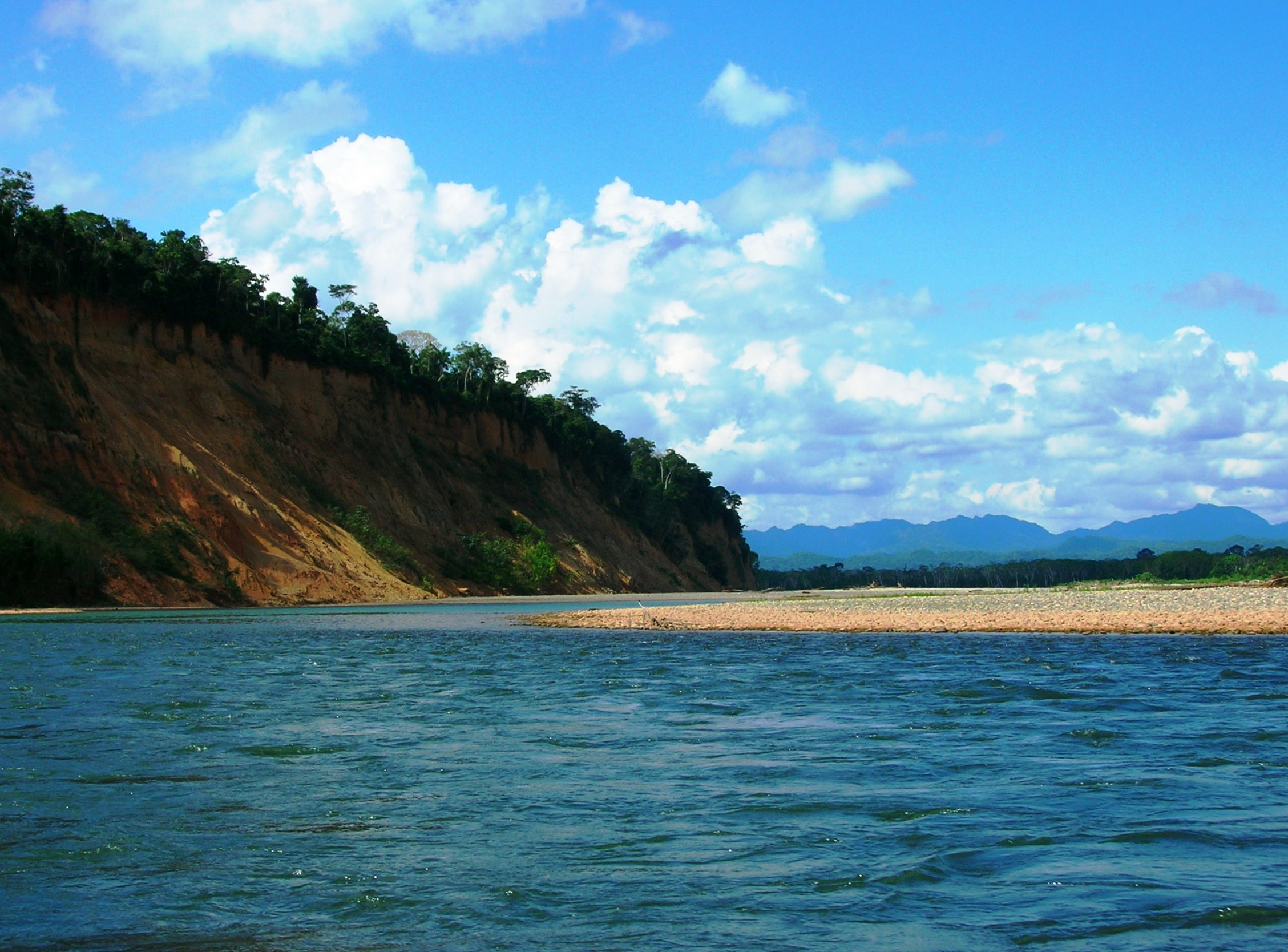 Madidi National Park, Bolivia